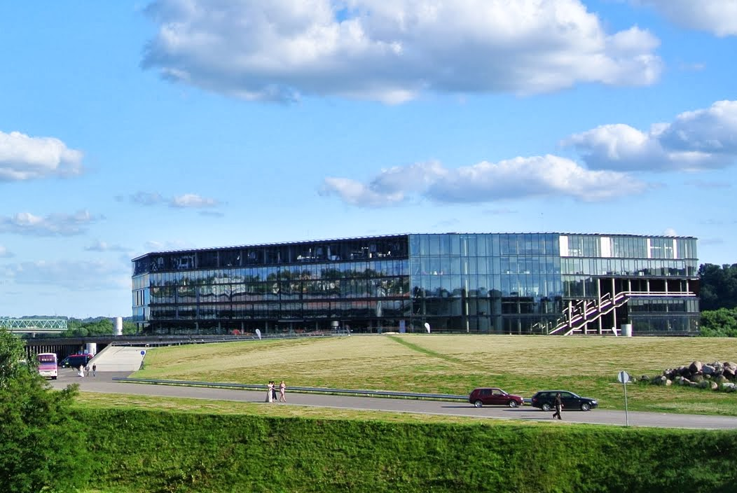 Centras, Kaunas, Lithuania